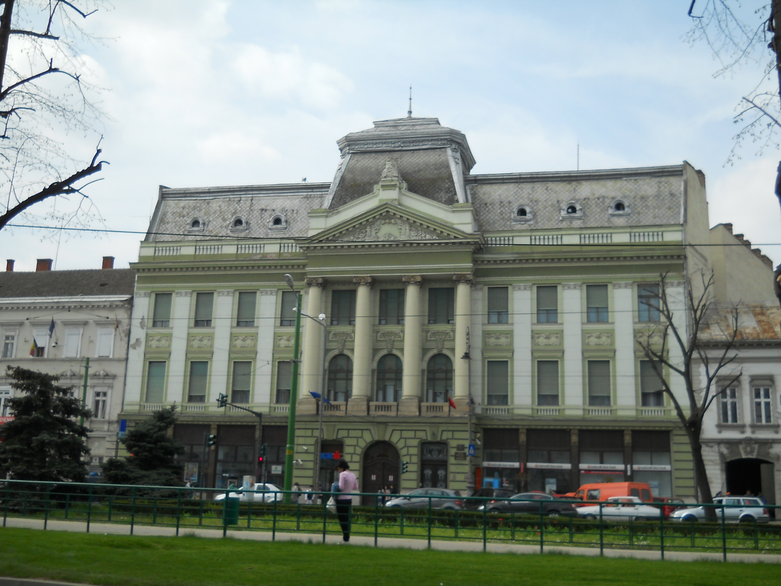 Imagine de ansamblu